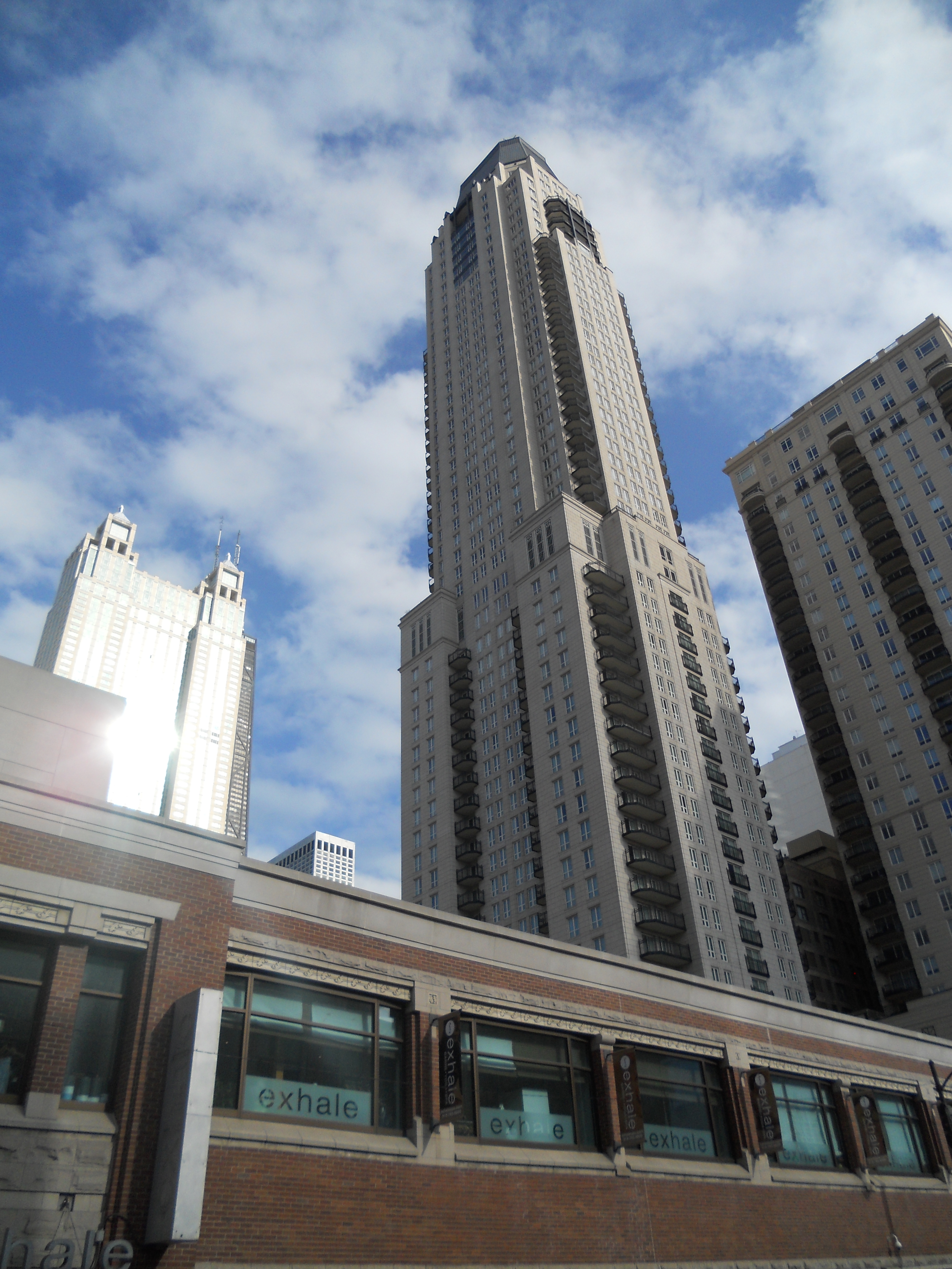 2015 Chicago 43